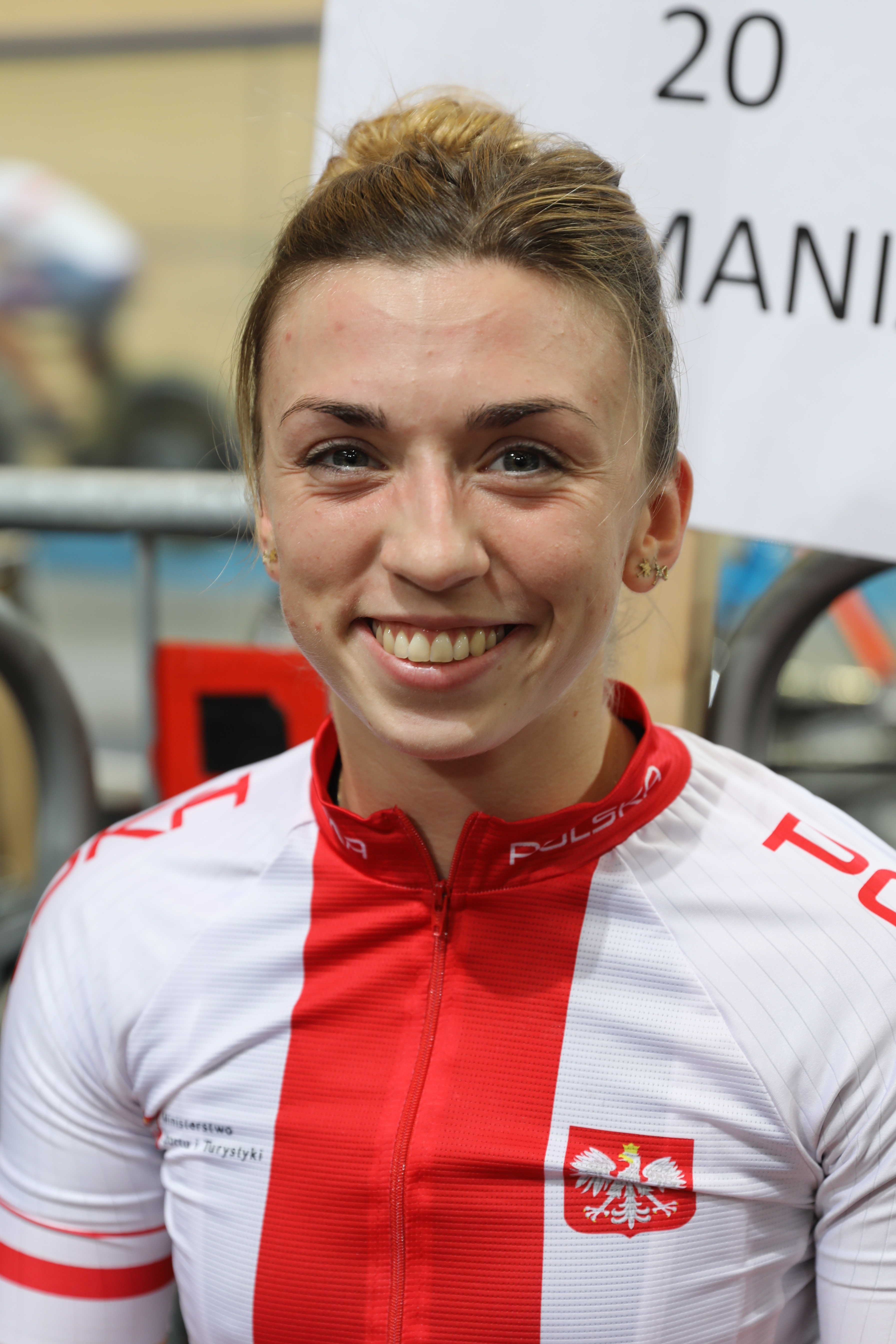 Urszula Łoś, polnische Radsportlerin